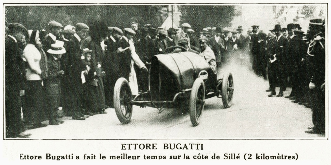 Victoire personnelle d'Ettore Bugatti à la côte de Sillé, en mai 1912 - La Vie au Grand Air du 1er juin 1912, p.388